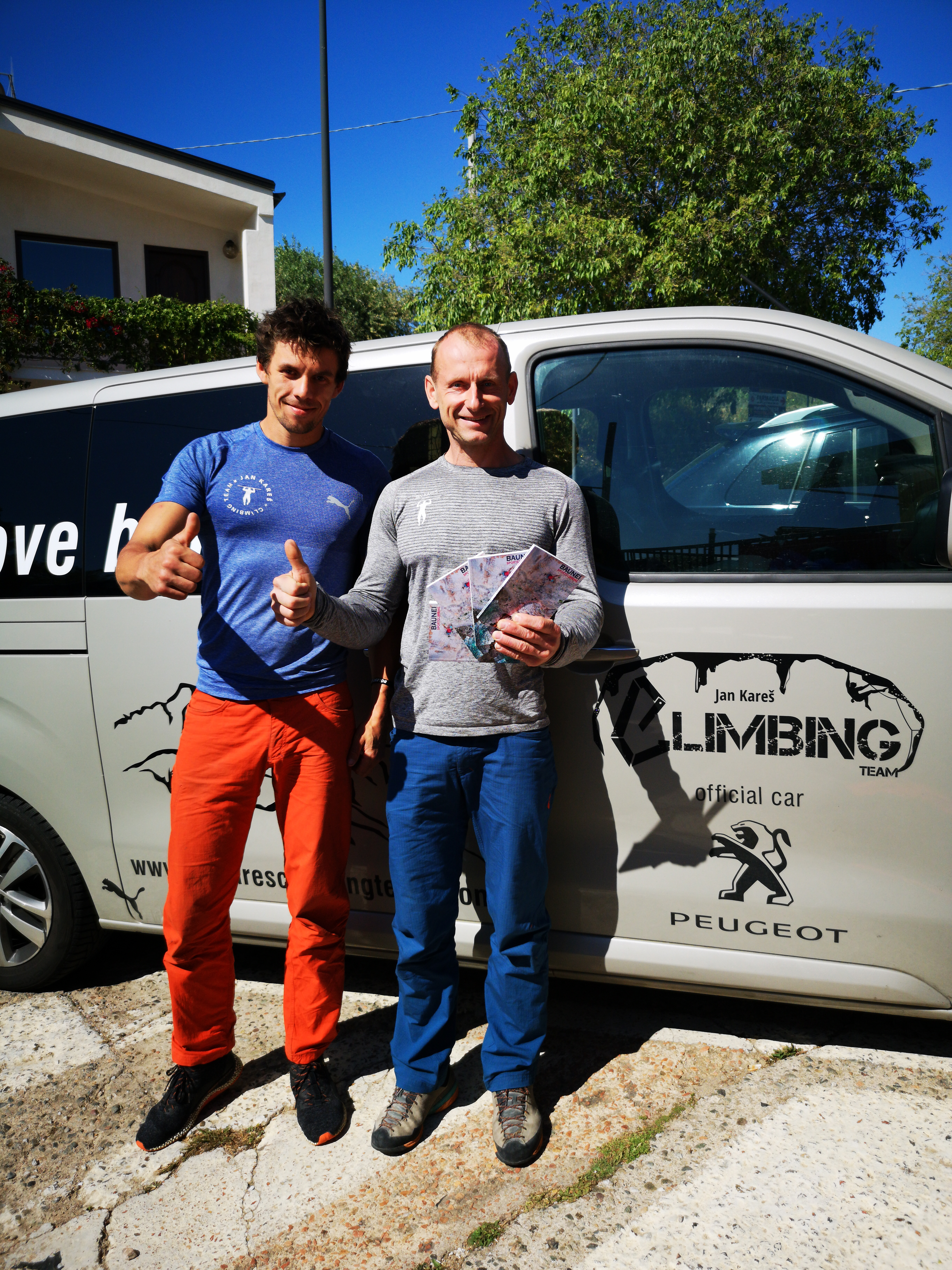 Jan Kareš (Karešák) s Jan Hrnčíř (Hrncem) na zájezd Květen 2019 zdroj: JanKarešClimbingTeam